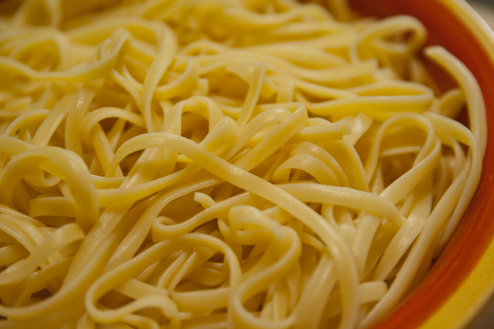 Un plat de spaghetti, exemple d'un système et d'une structure complexe.